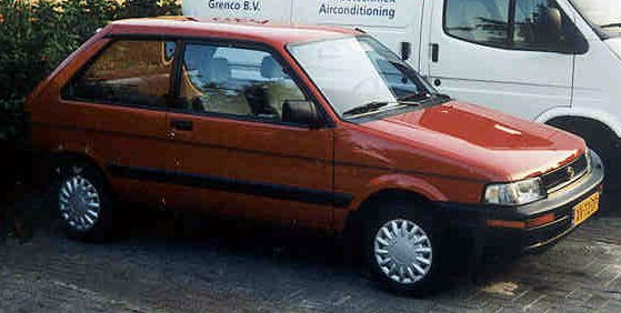 Subaru Justy uit nl:1989